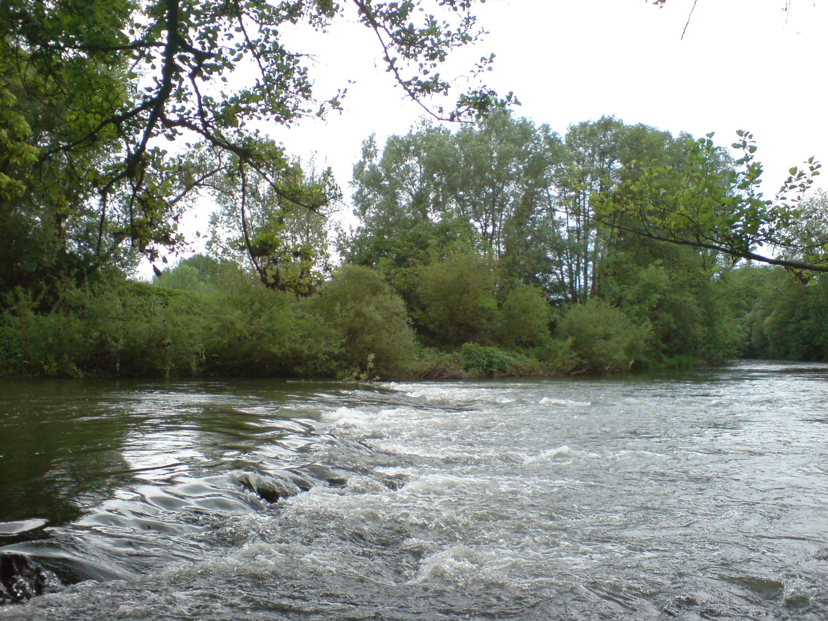 Die Jagst bei Untergriesheim, Stromschnelle unterhalb der Schefflenz- und oberhalb der Tiefenbachmündung, ca. 15 m3/s Durchfluss zum Aufnahmezeitpunkt